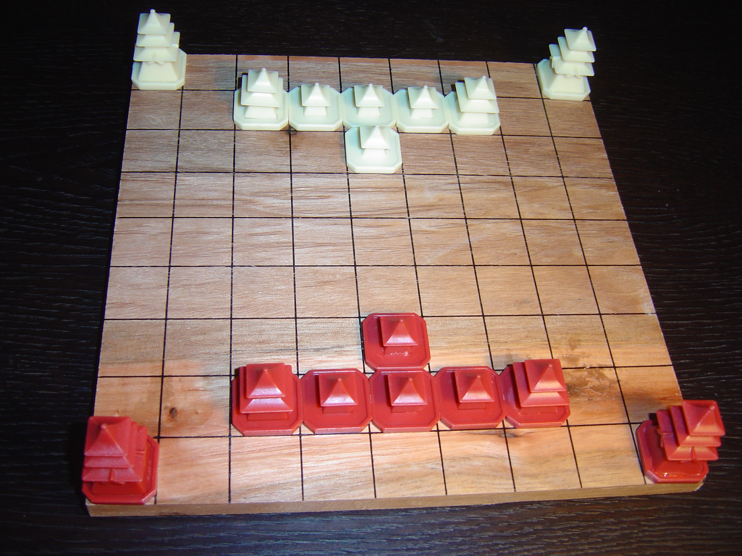 Oshi game